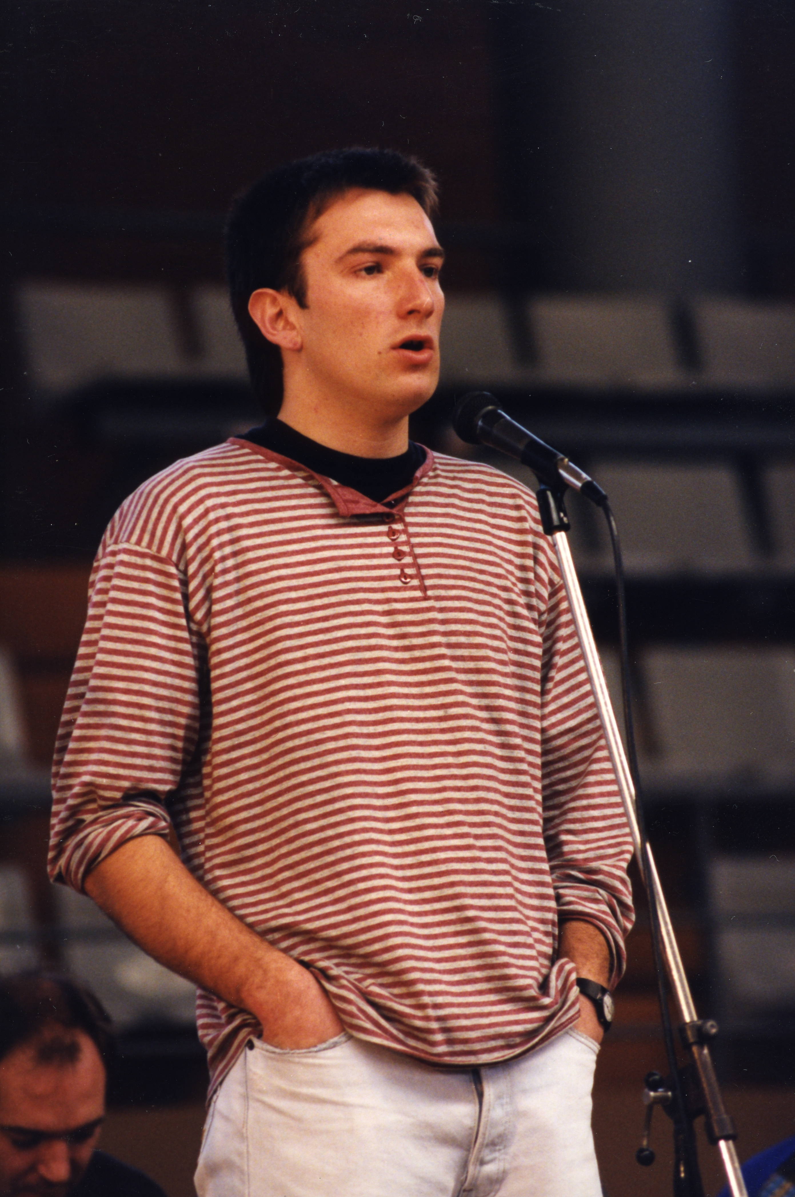 Jon Maia. Aiurri 11 zbk. 5. orr.